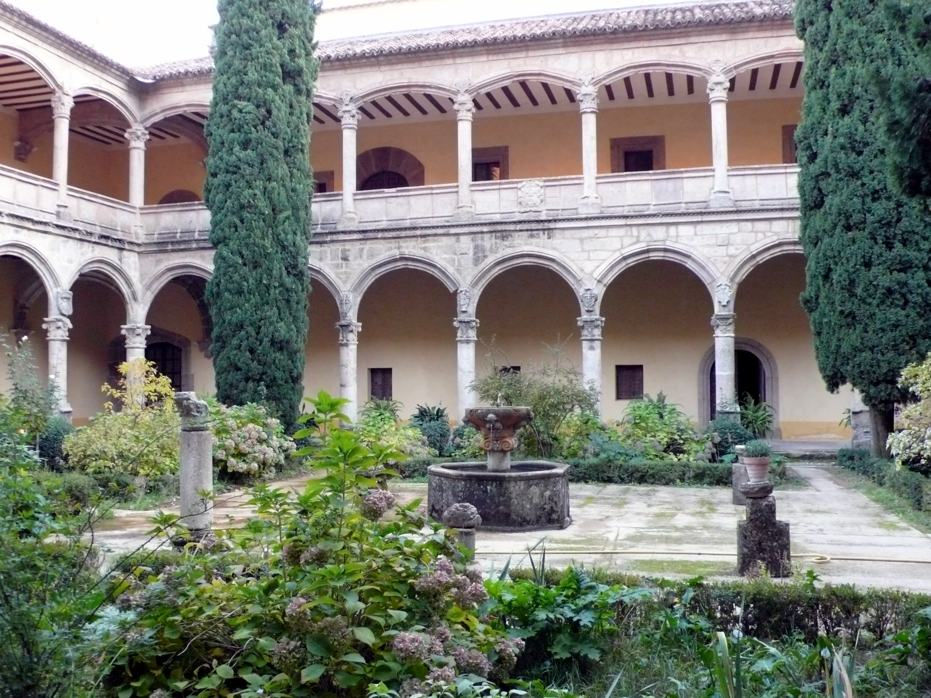 Sobre los capiteles, escudos de leones y capelos de la Orden de San Jerónimo. Atributos de la Pasión. Otros, blasones de los Zúñigas, Álvarez de Toledo, Figueroa y Guzmanes.